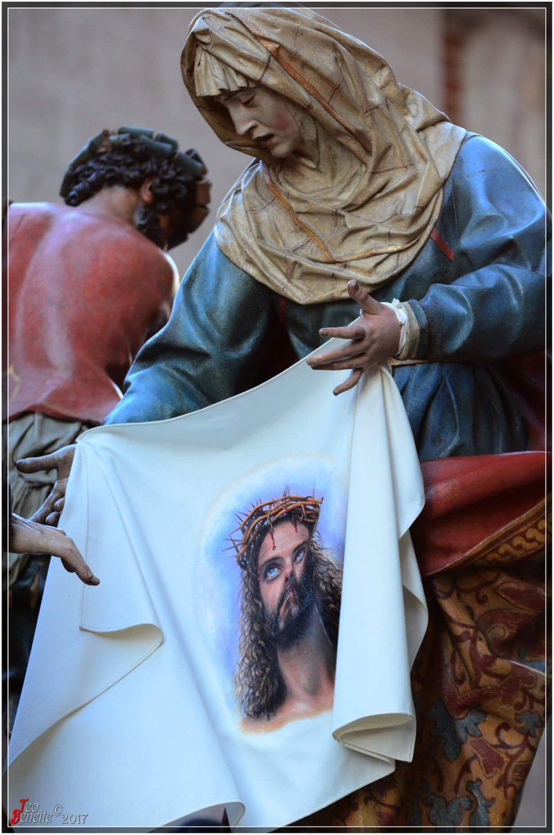 Escultura en madera policromada obra del Gregorio Fernández y paño realizado por el pintor vallisoletano Miguel Galván. Es una de las cinco tallas perteneciente al conjunto escultórico "Camino del Calvario" que se encuentra en el Museo Nacional de Escultura Policromada de Valladolid. Representa a la Verónica con el paño donde se encuentra impresa la cara de Cristo.